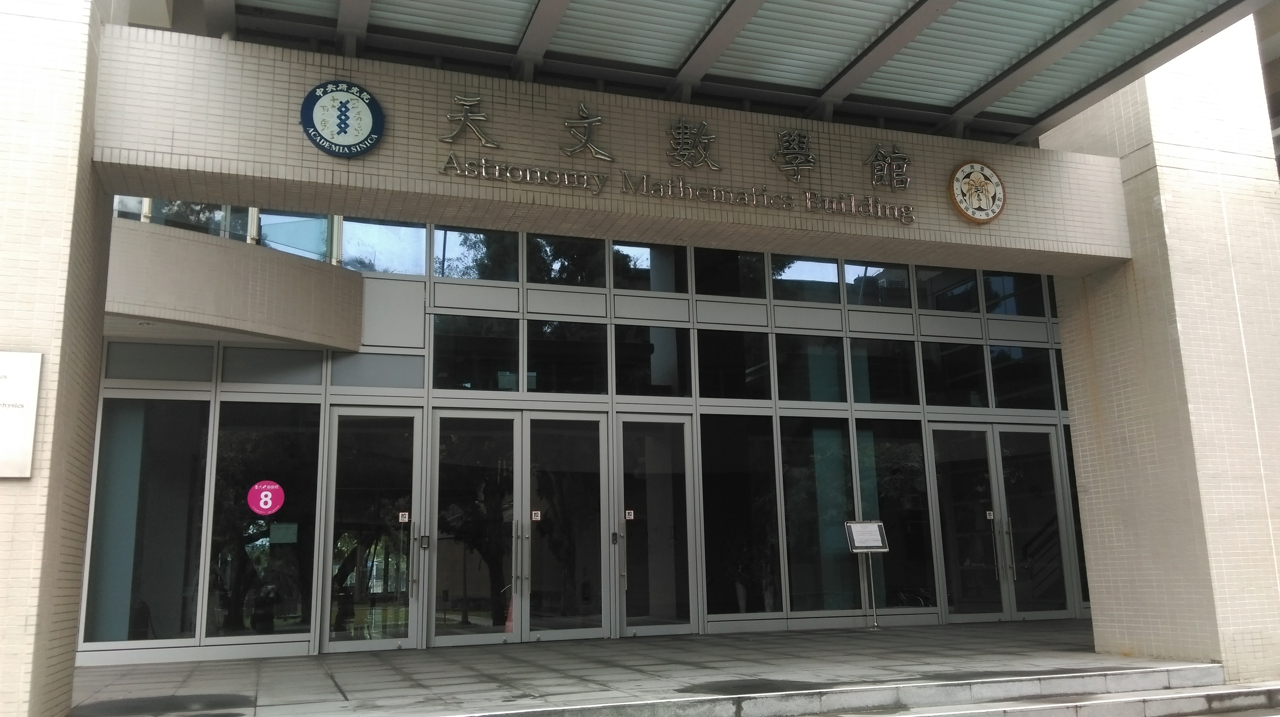 中文（中国大陆）: 中央研究院天文及天文物理研究所位于国立台湾大学天文数学馆内